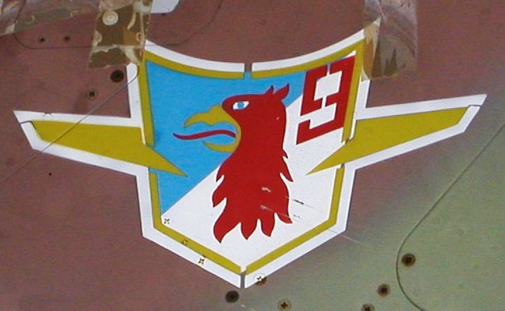 Geschwaderemblem des JG-9 (der Öffentlichkeit am 05.06.1990 vorgestellt) am Seitenleitwerk der MiG-23 ML "332", die momentan auf dem Freigelände des Historisch-Technischen Informationszentrums (HTI) in Peenemünde ausgestellt wird; (Quelle: HTI Peenemünde)